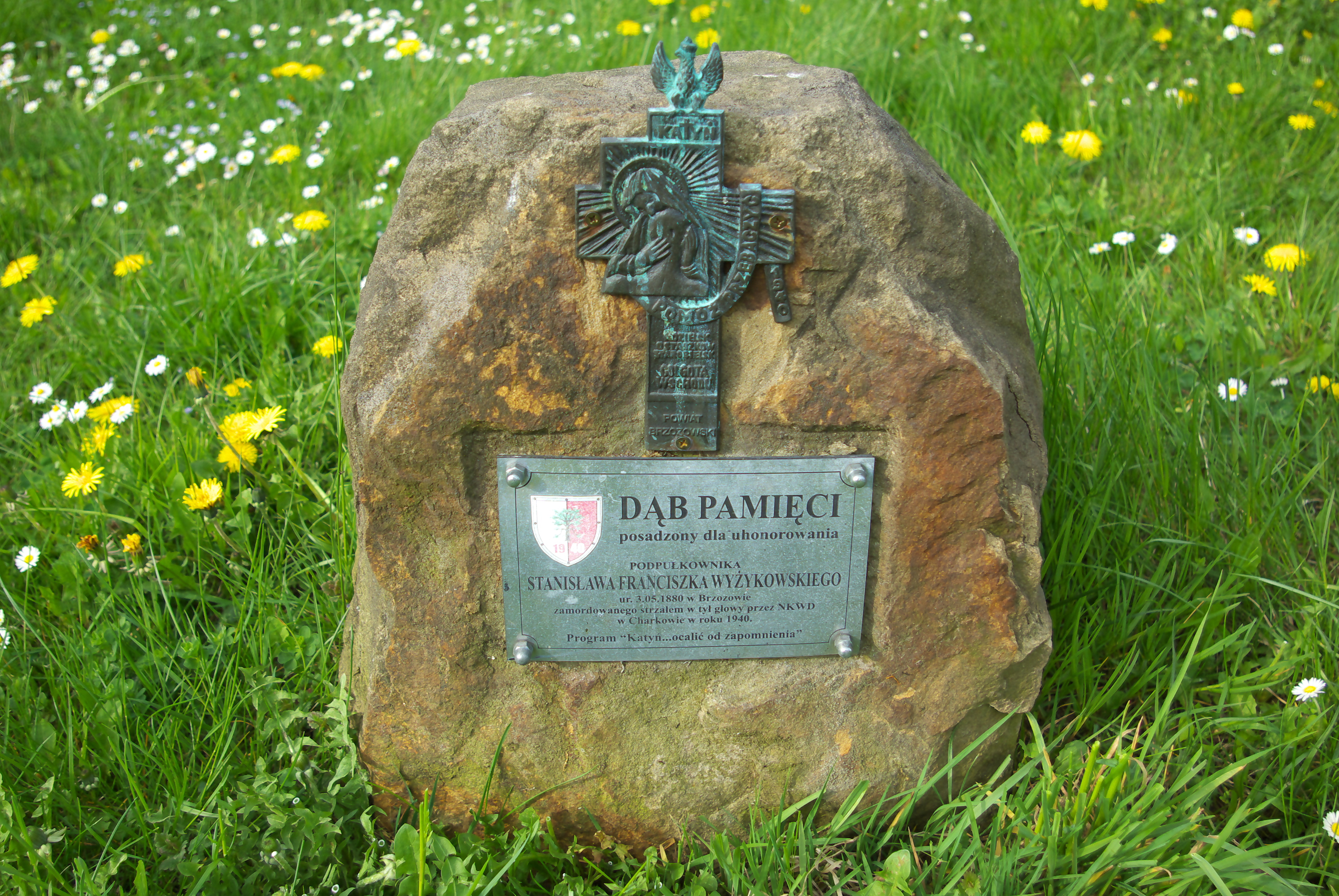 Dąb Pamięci honorujący Stanisława Wyżykowskiego w Brzozowie (Zespół Szkół Budowlanych im. Tadeusza Kościuszki w Brzozowie, ul. Słoneczna 6).